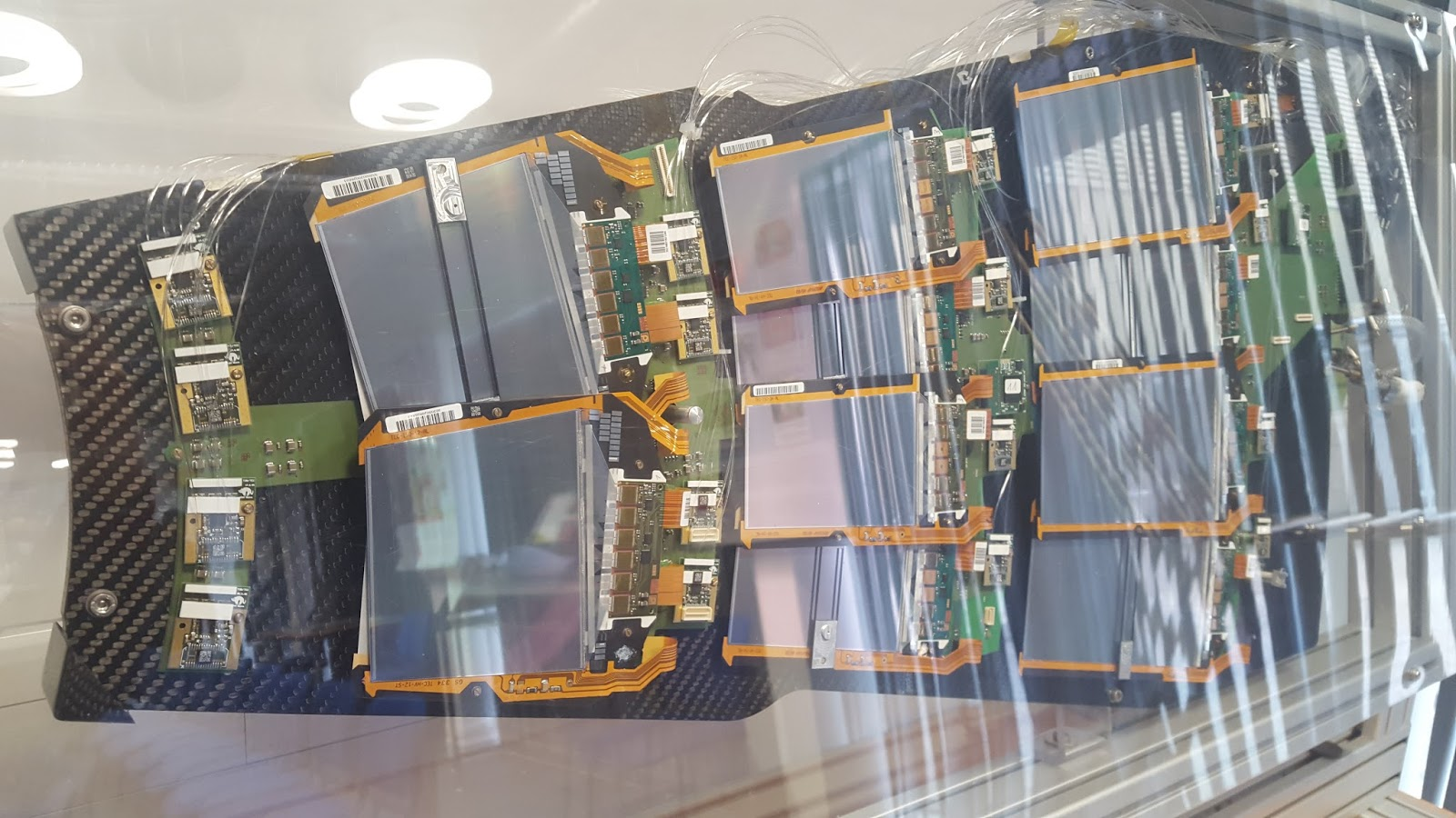 דגם המראה את שכבות גלאי הCMS